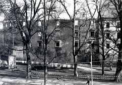 Bild wurde mir vom Stadtarchiv Wels zur Verfügung gestellt